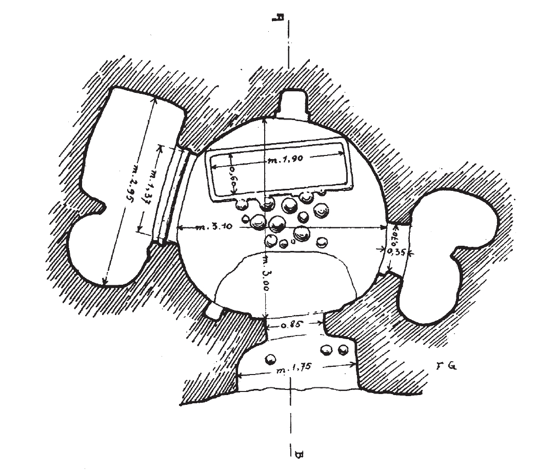 Disegno di Francesco Giarrizzo.